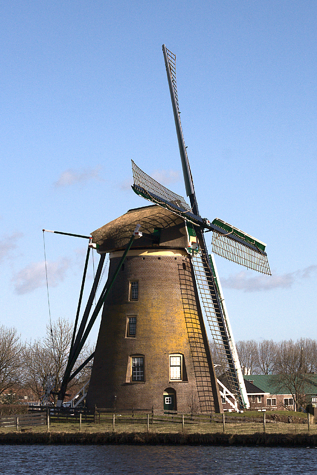 Googermolen, gezien vanaf de Huigsloterdijk